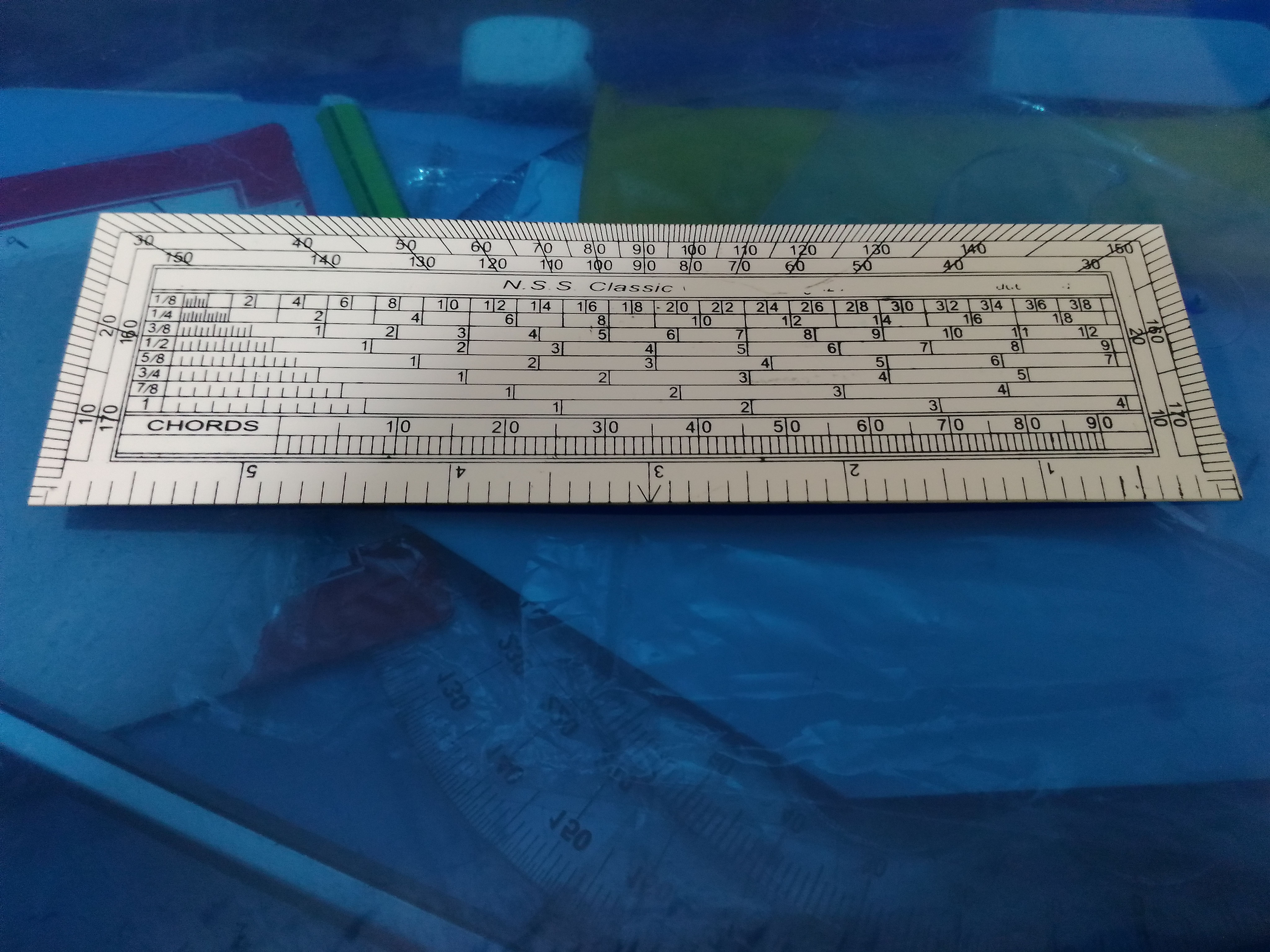 a diagonal scale.